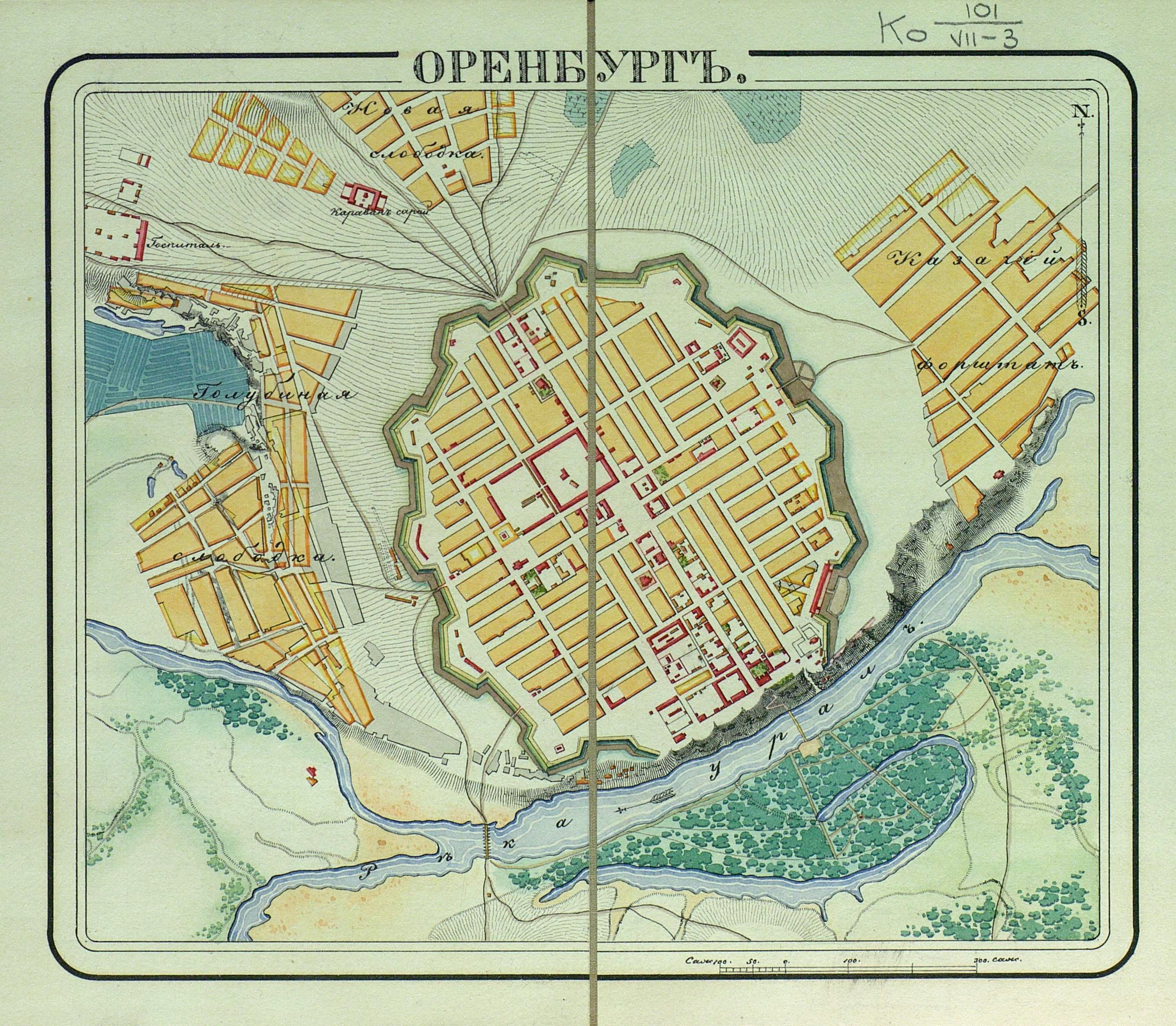 Оренбург.